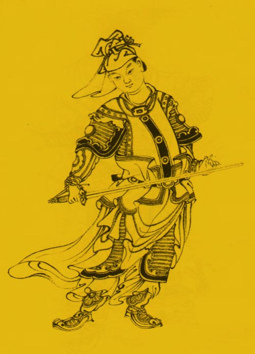 中文（中国大陆）: 张德胜，明朝军事将领